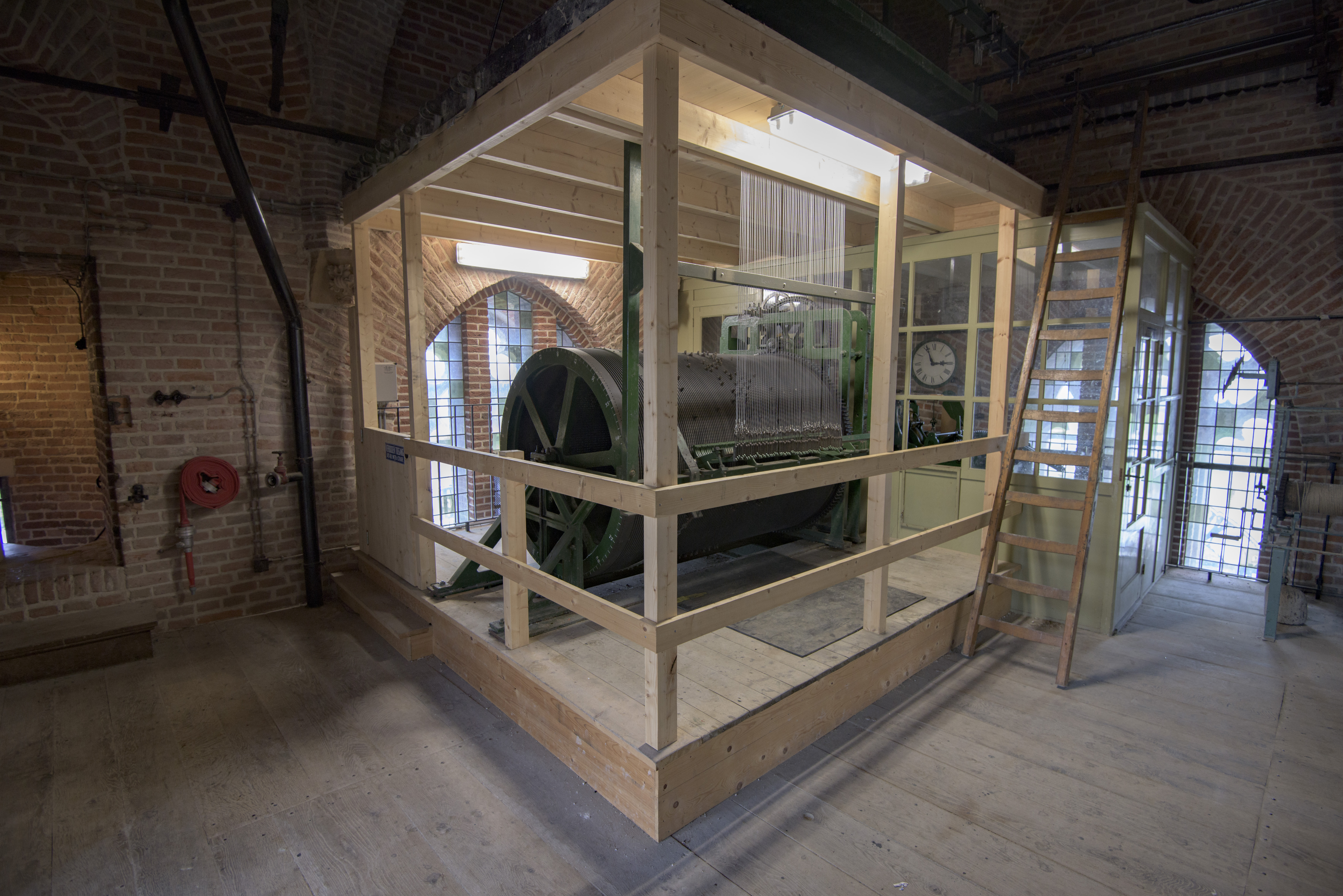 De toren van de Grote of Lebuïnuskerk van binnen.